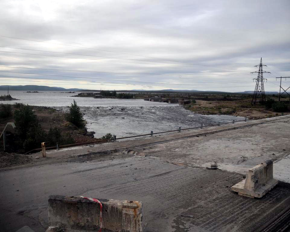 Мост через Мончу